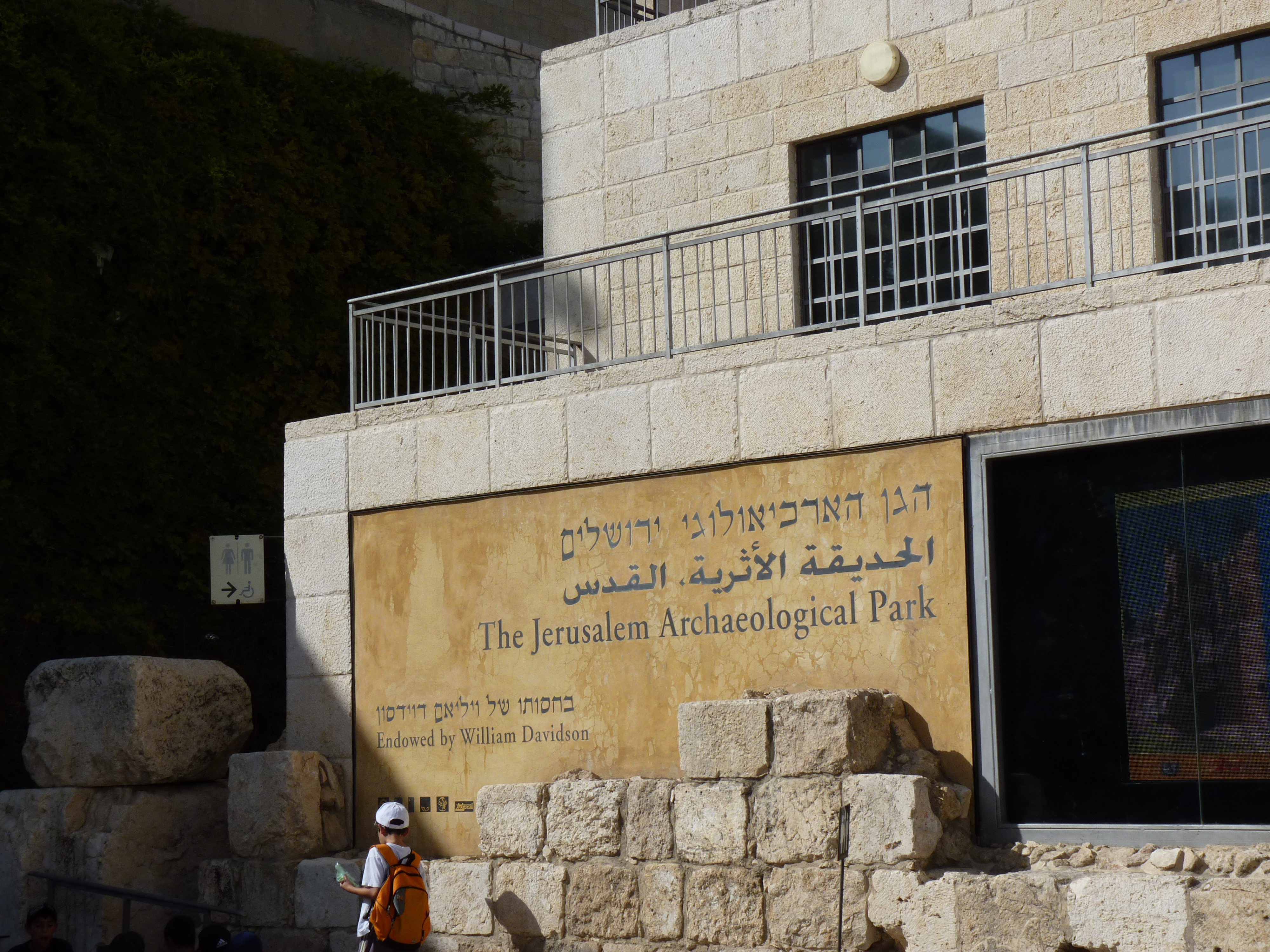 P1080434 Jerusalem - Parque Arqueológico